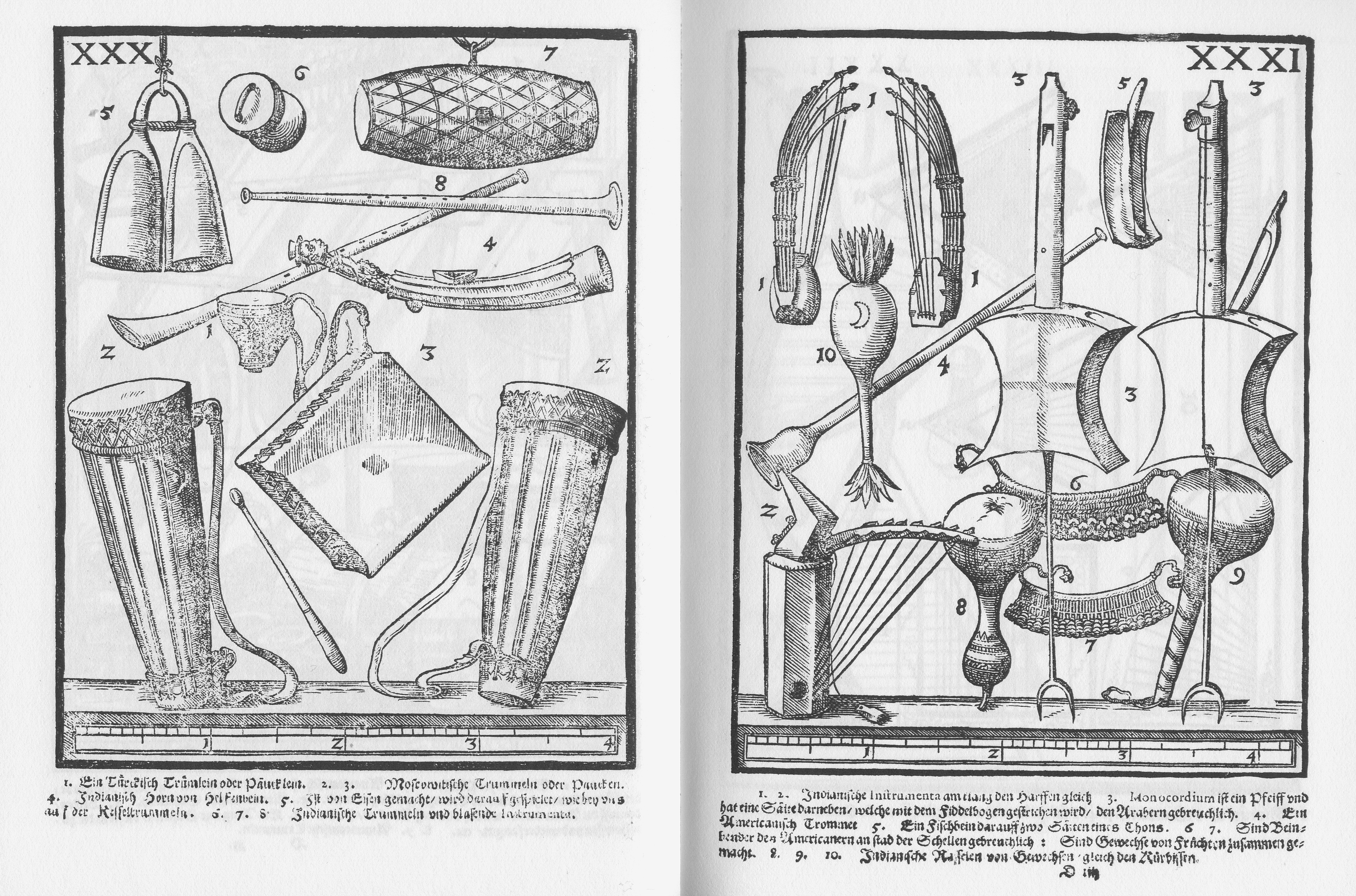 Syntagma Musicum Theatrum Instrumentorum seu Sciagraphia Wolfenbüttel 1620